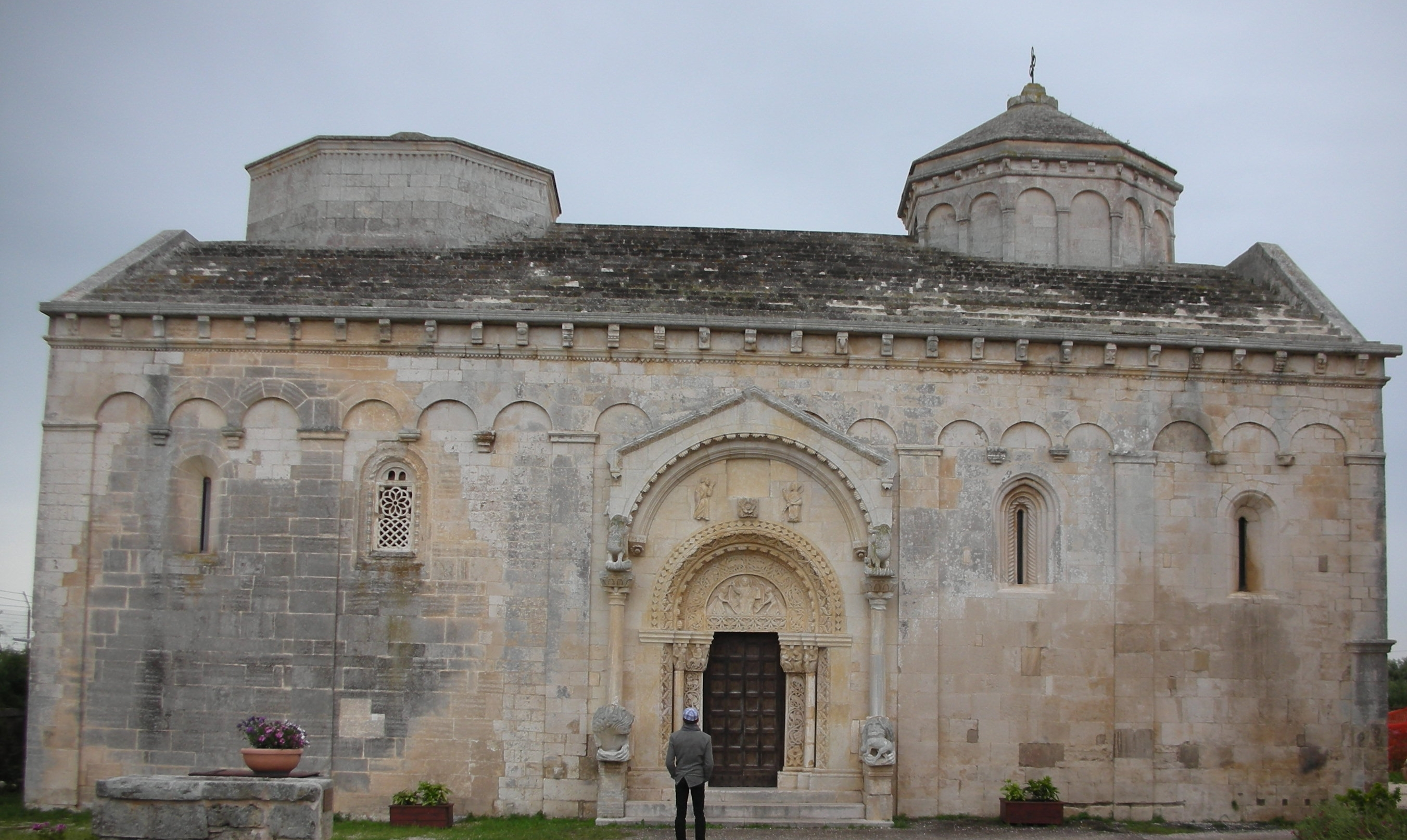 Façade nord de l'église abbatiale San Leonardo di Siponto (Pouilles)